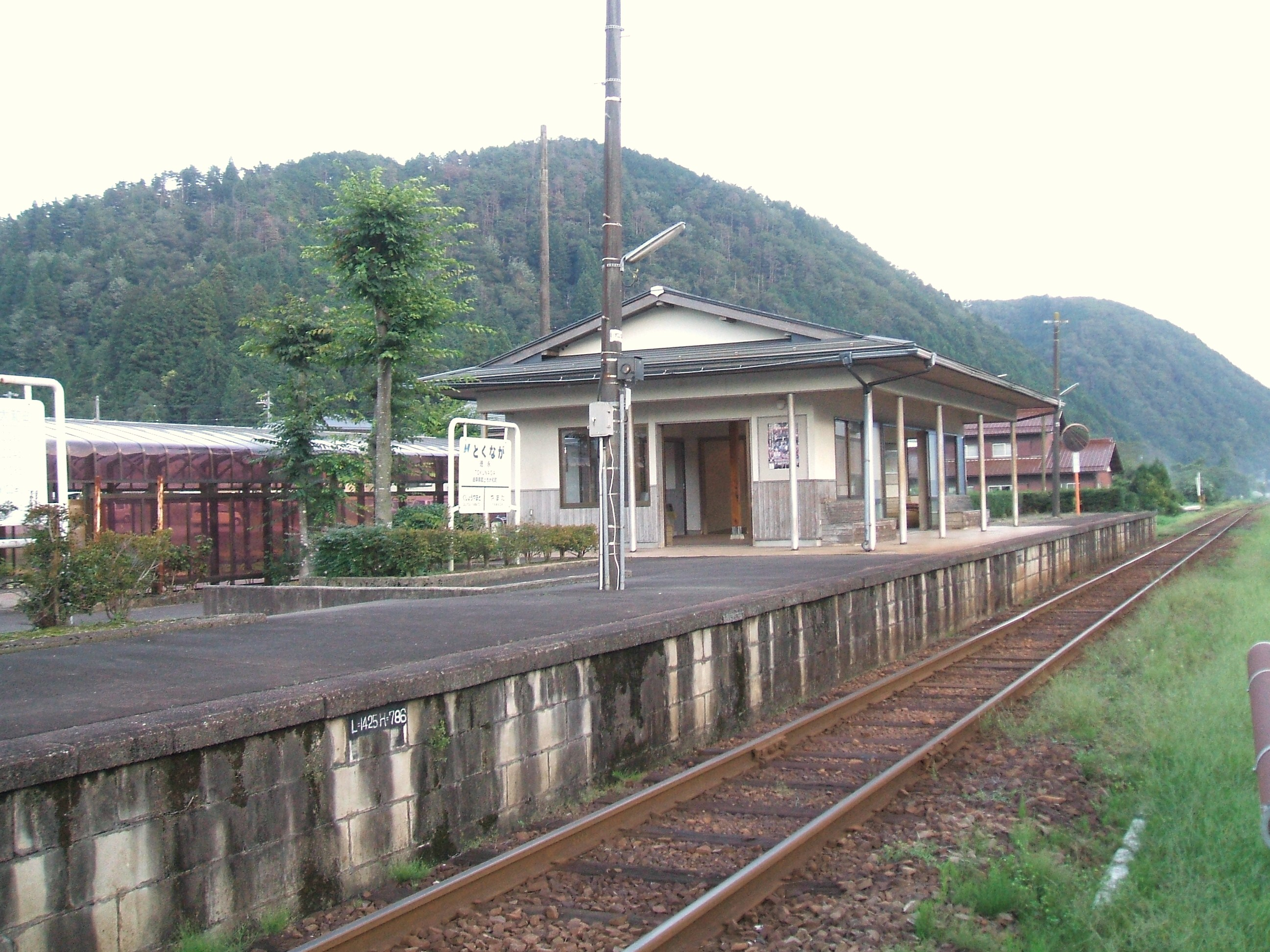 駅の様子。